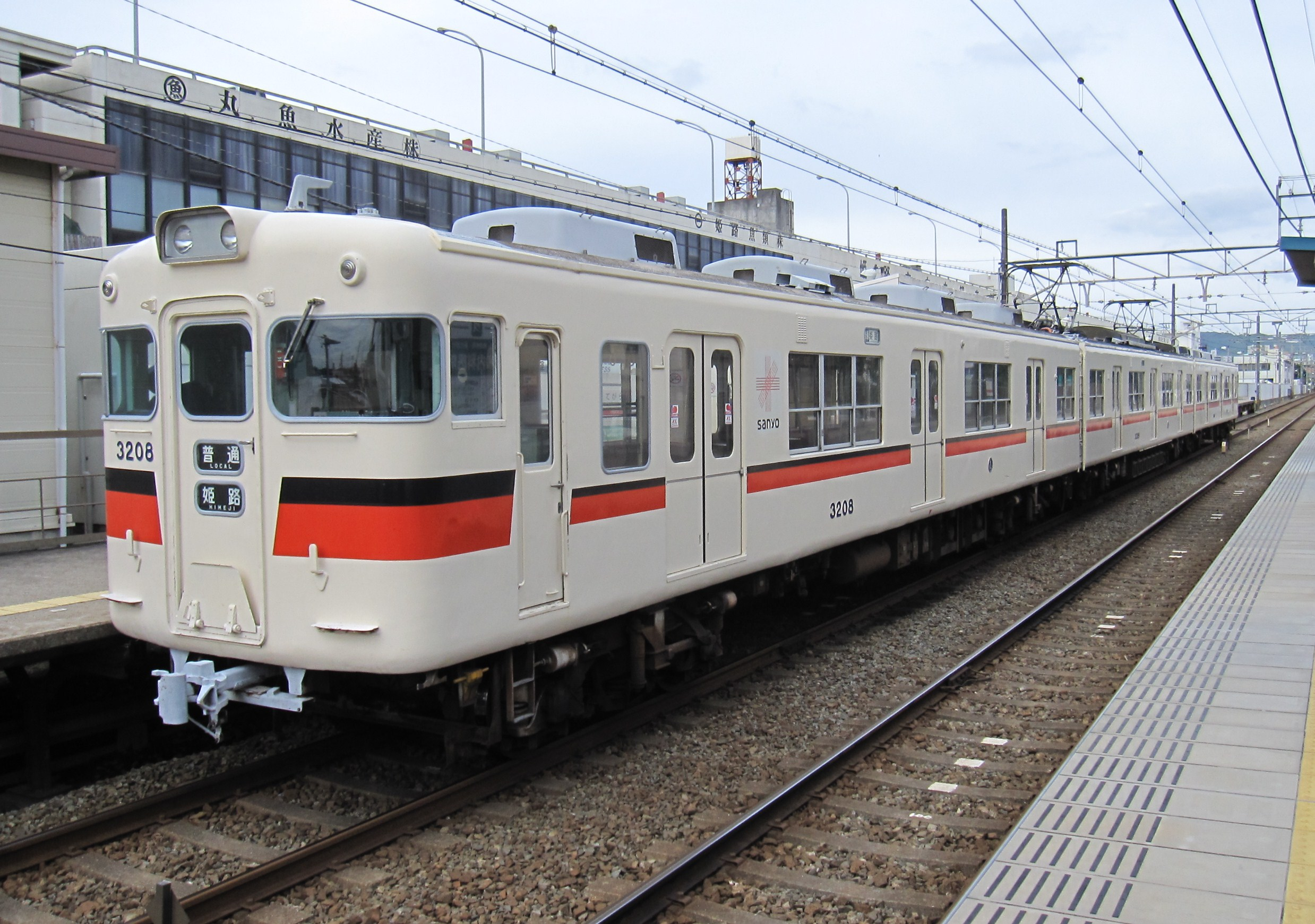 山陽電気鉄道3200系